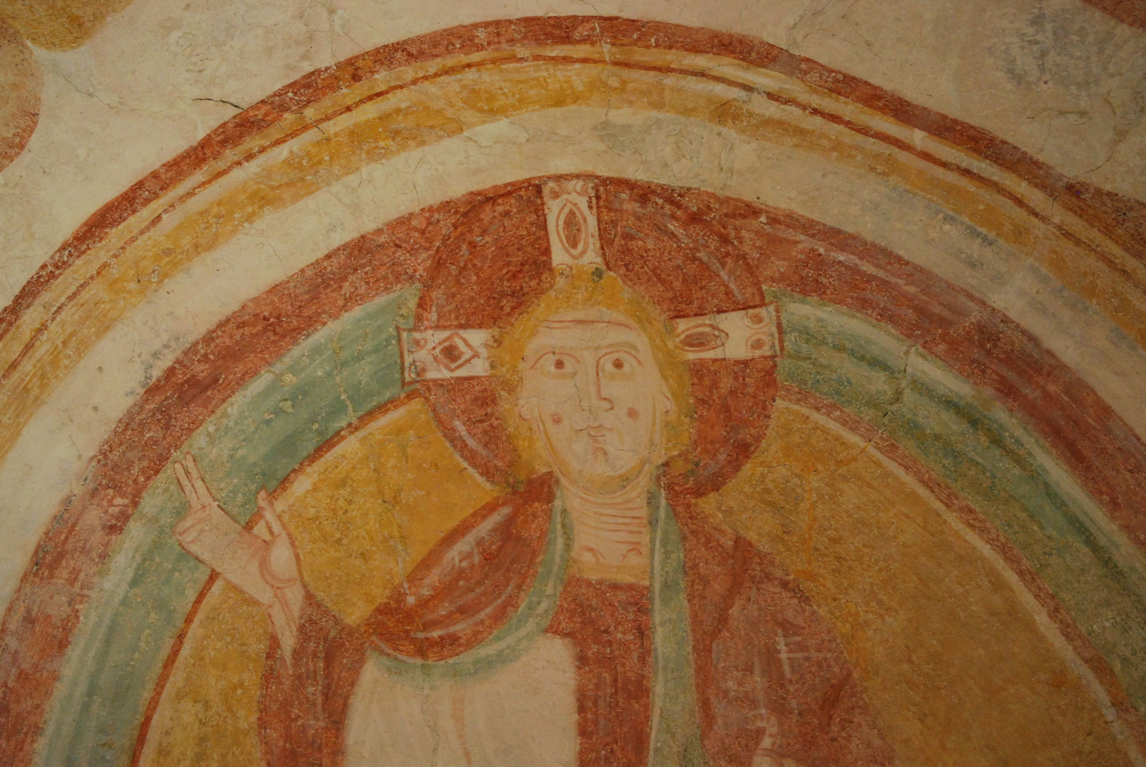 fresque romane du XIIe siècle